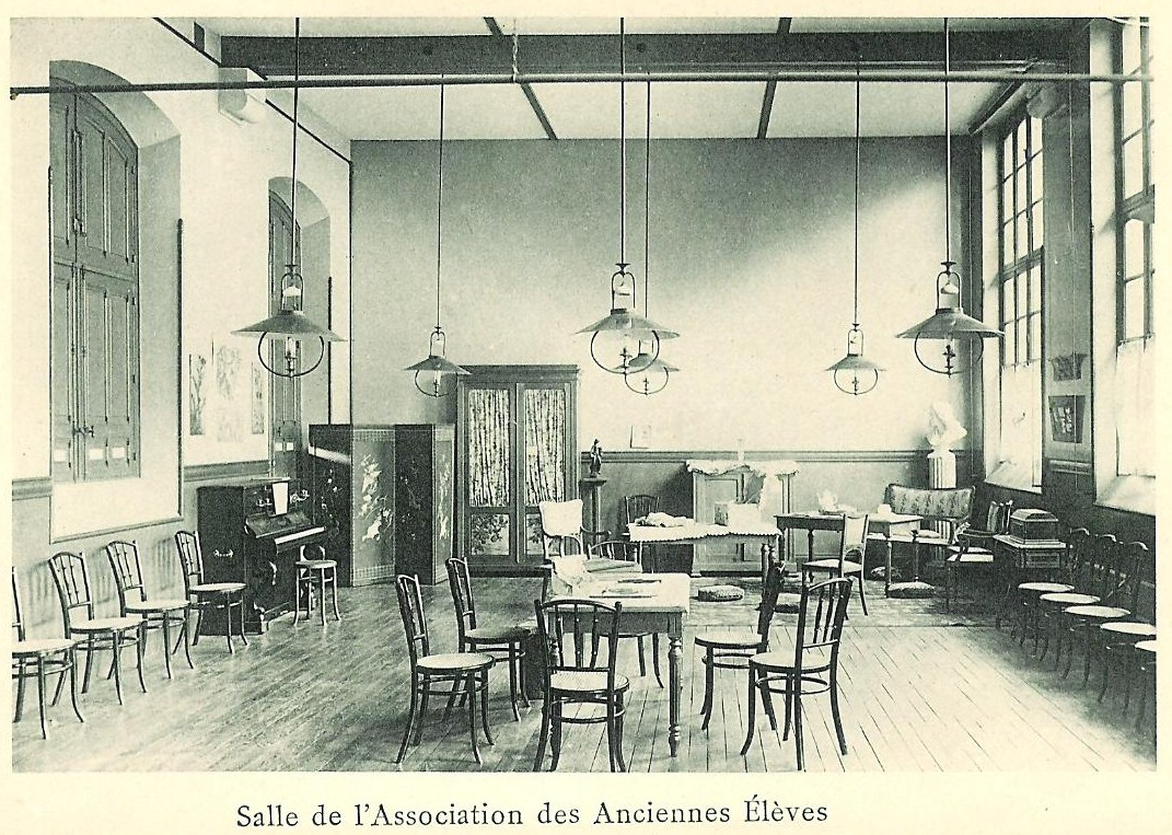 Salle des anciennes élèves du lycée Molière (Paris)